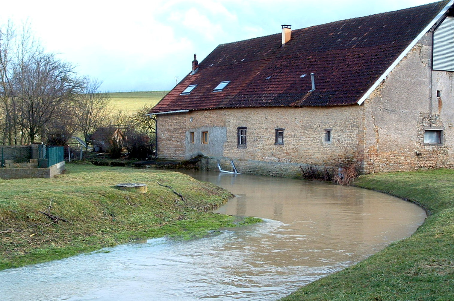 Le ruisseau de Noironte en crue, le 10 mars 2006, et l'ancien moulin.